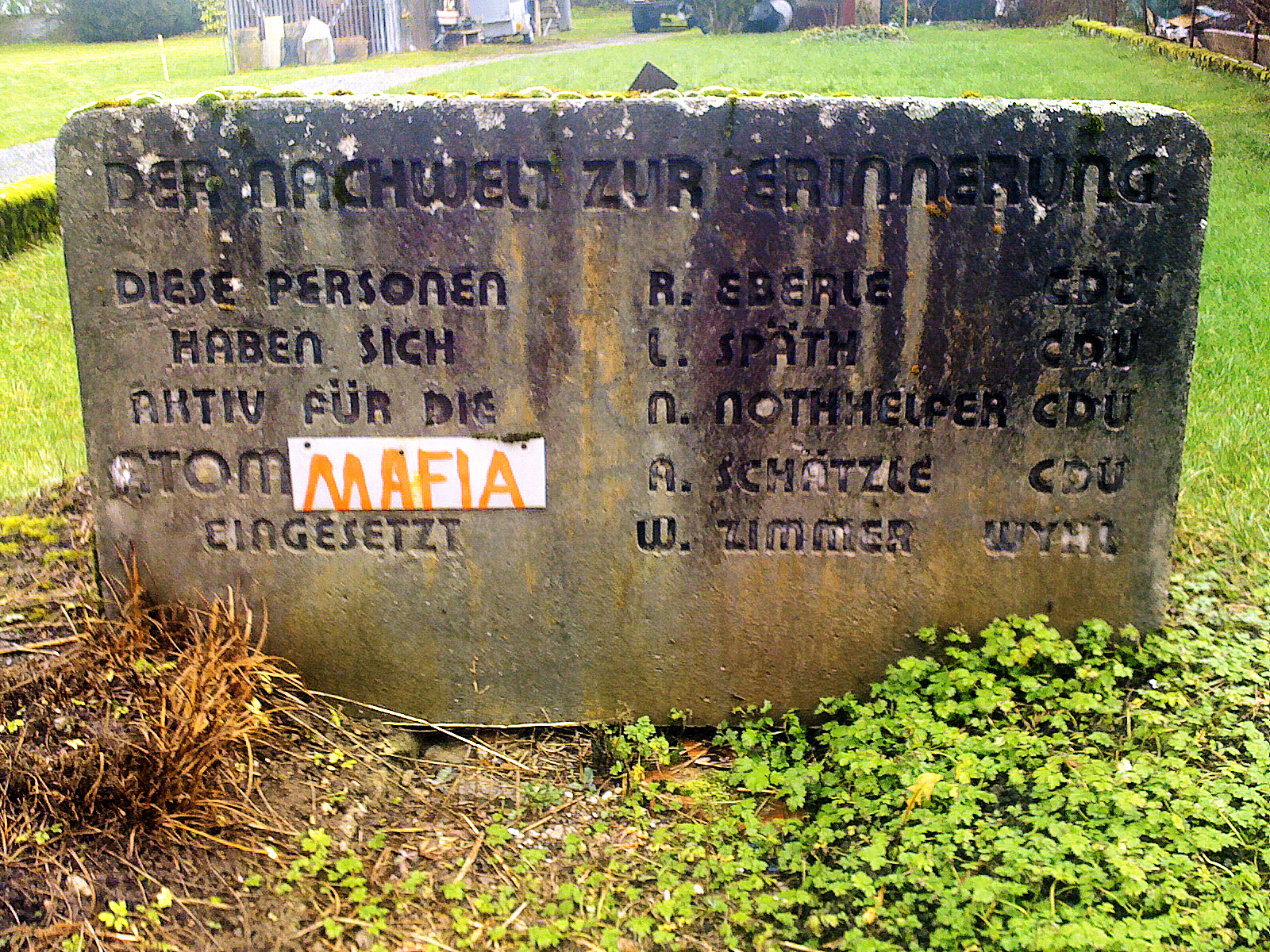 Dieser „Grabstein“ wurde Ende der 1970er Jahre in Waldkirch i. Br. unter dem Eindruck der Proteste gegen das AKW Wyhl aufgestellt. Unter der später angebrachten Aluplatte mit dem Wort „MAFIA“ war ursprünglich das Wort -„KRAFT“ zu lesen.